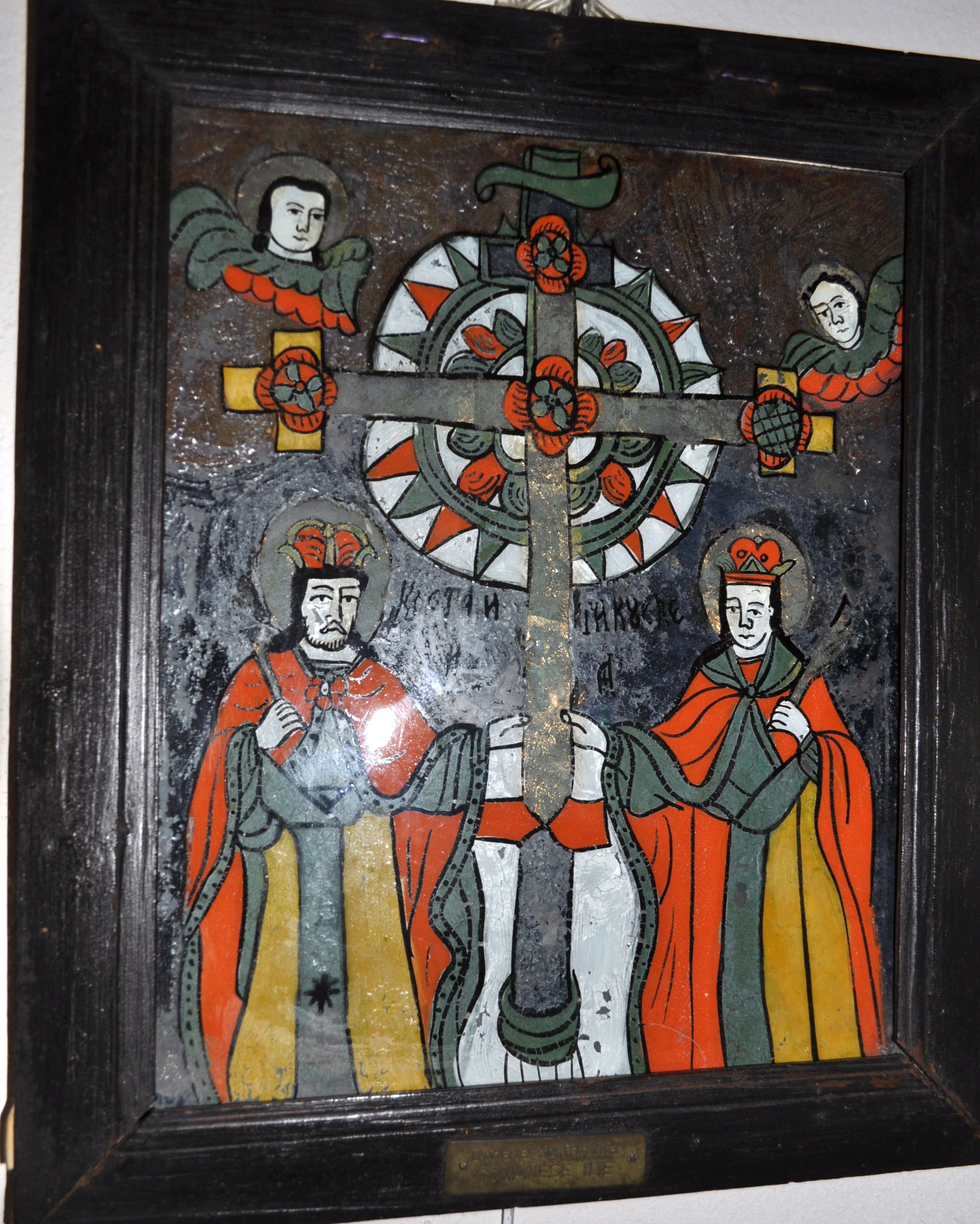 Muzeul de icoane pe sticlă „Pr.Zosim Oancea” din Sibiel